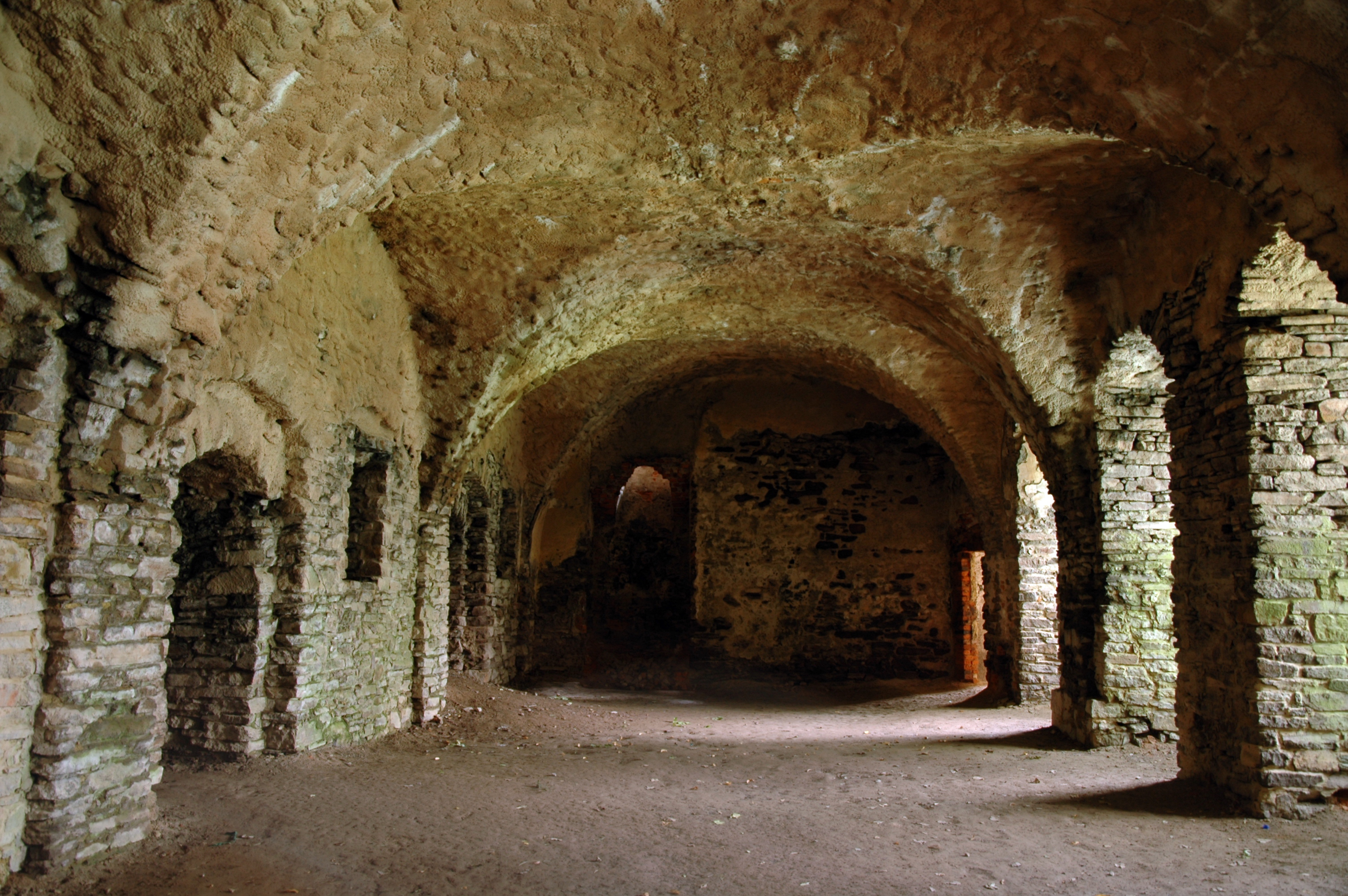 Zamek Świny - podziemia